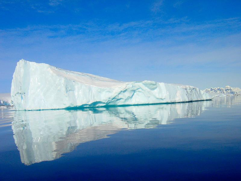 Nature Antarctica